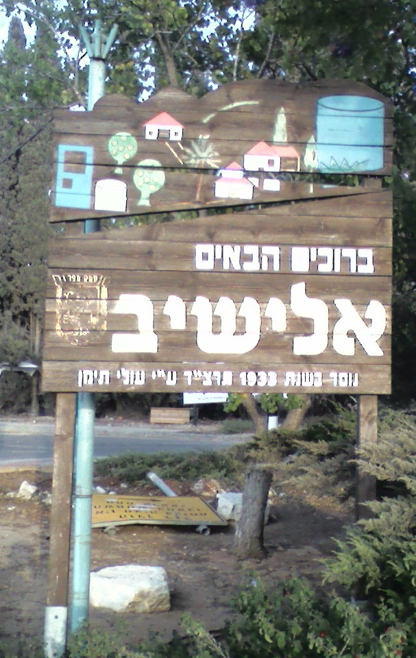 תמונה די חדשה